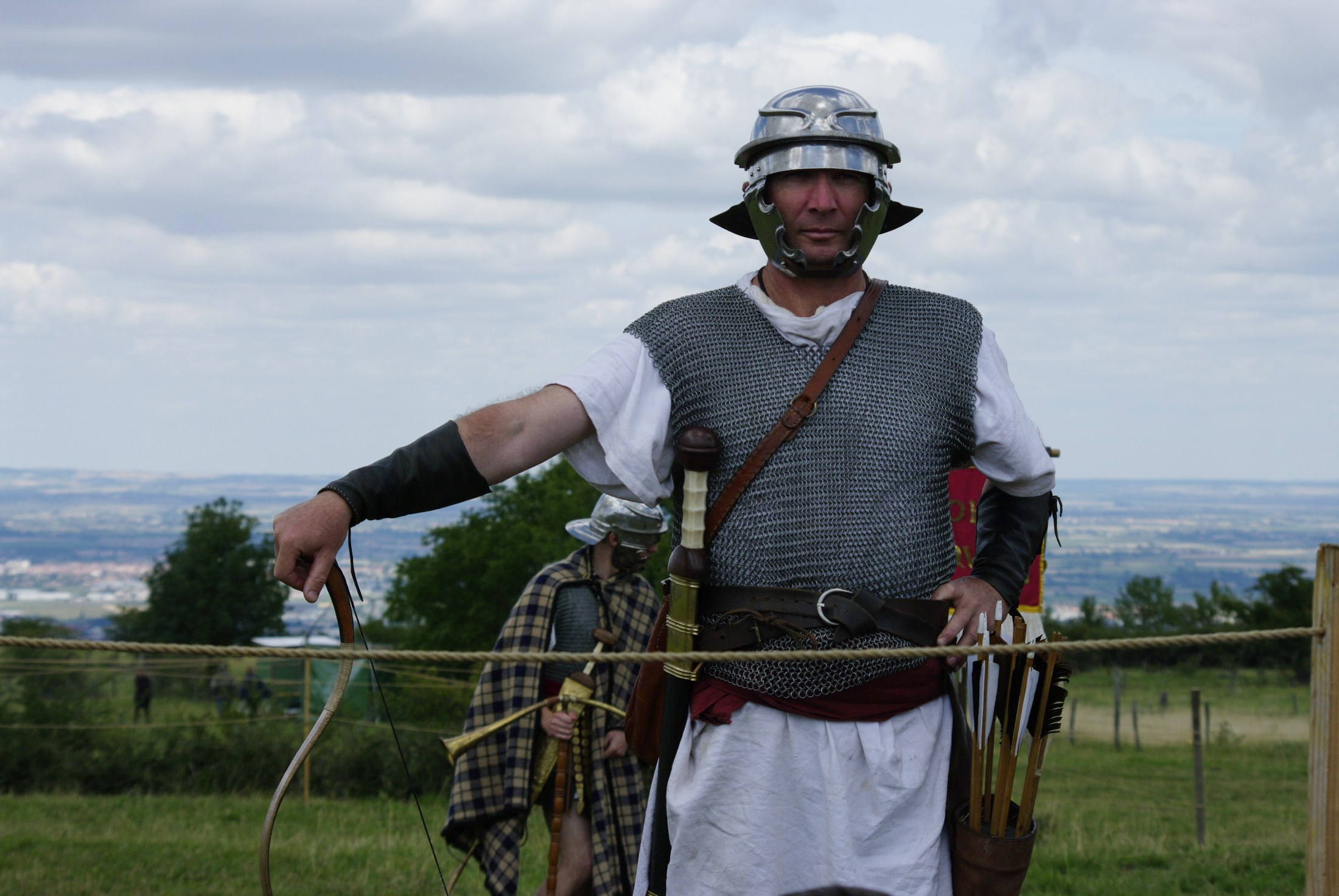 Archer romain du groupe de reconstitution "Via Romana" lors de la manifestation "Les Arverniales" édition 2011 sur le plateau de Gergovie, Puy-de-Dôme.